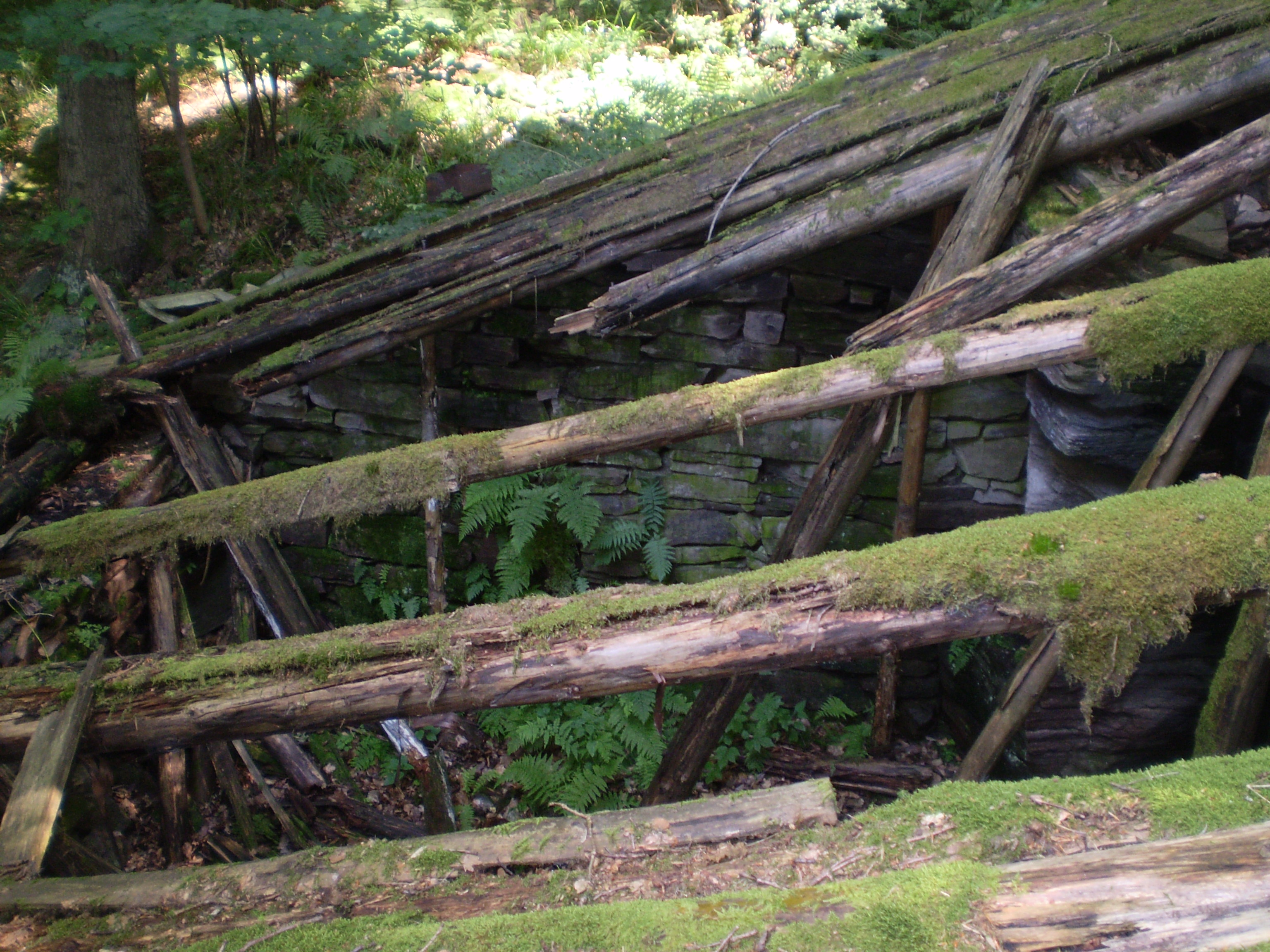 Jermak